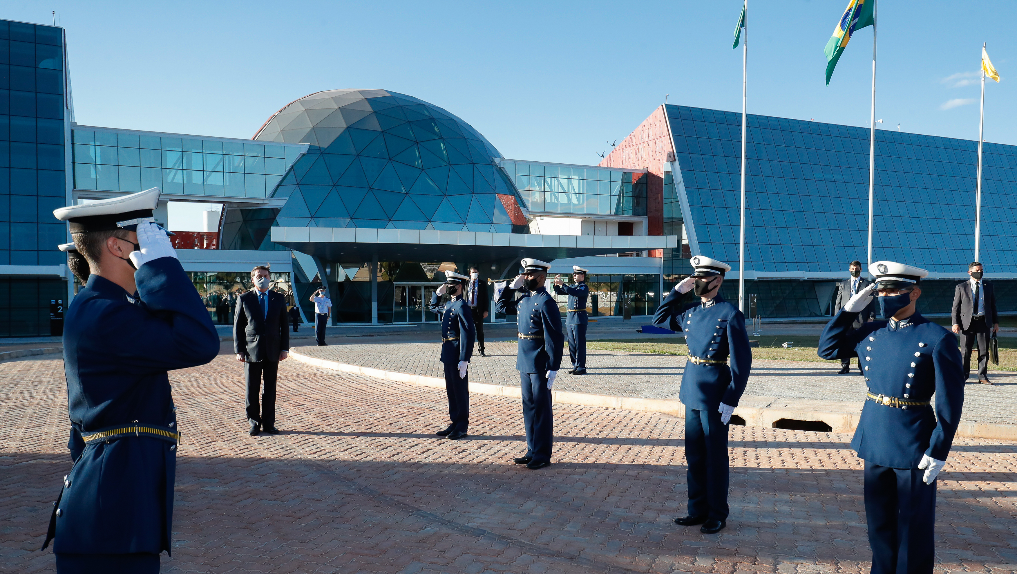 (Brasília - DF, 23/06/2020) Cerimônia de Inauguração do Centro de Operações Espaciais Principal (COPE-P).Foto: Alan Santos/PR